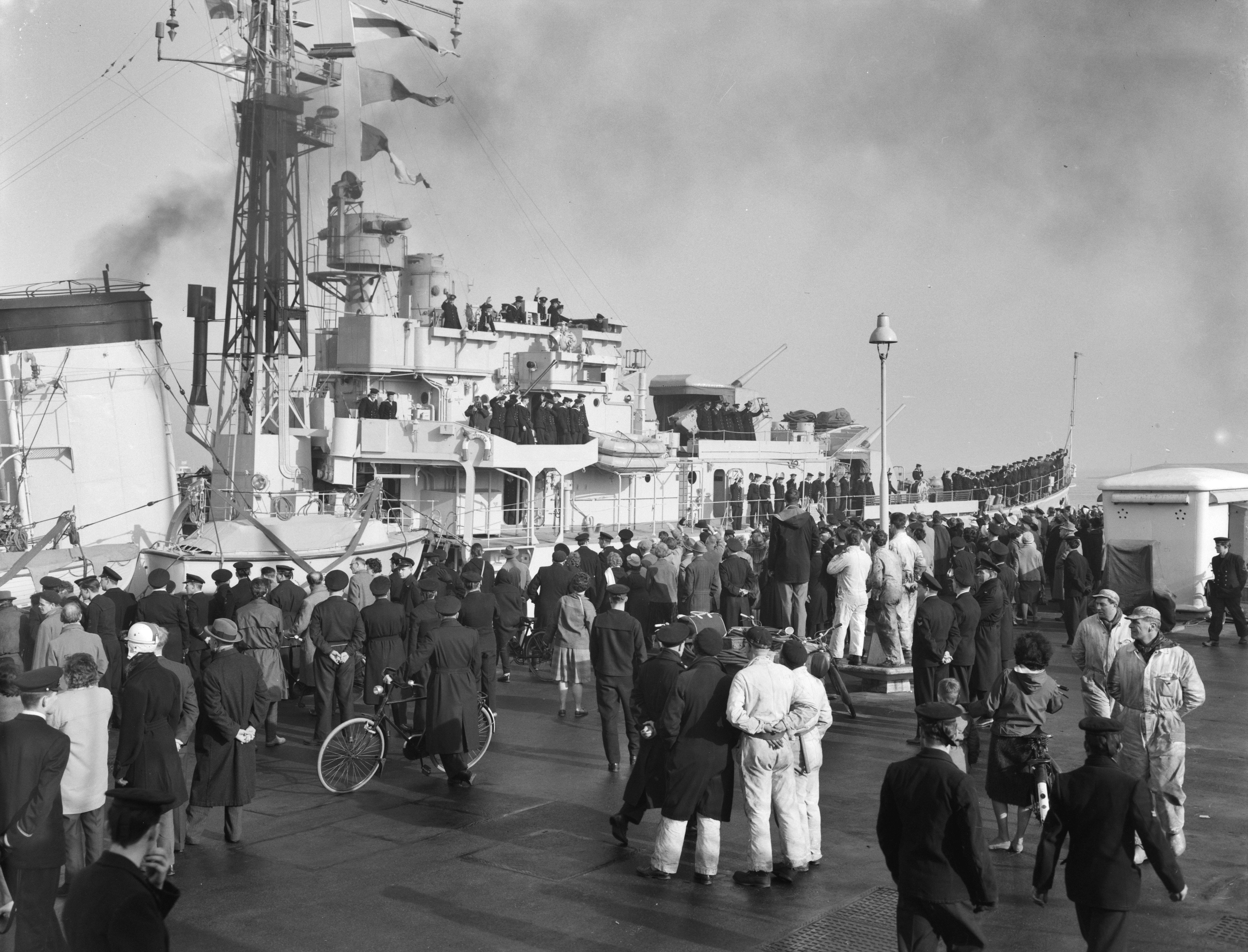 Collectie / Archief : Fotocollectie Anefo Reportage / Serie : [ onbekend ] Beschrijving : Vertrek van Hr. Ms. fregat "Evertsen" uit Den Helder naar Nieuw Guinea , nagewuifd door wegbrengers vertrekt de "Evertsen" Datum : 15 februari 1961 Locatie : Den Helder, Nieuw-Guinea Trefwoorden : marine, schepen, uitlopen Persoonsnaam : Hr Ms Evertsen Fotograaf : Rossem, Wim van / Anefo Auteursrechthebbende : Nationaal Archief Materiaalsoort : Negatief (zwart/wit) Nummer archiefinventaris : bekijk toegang 2.24.01.04 Bestanddeelnummer : 912-1018